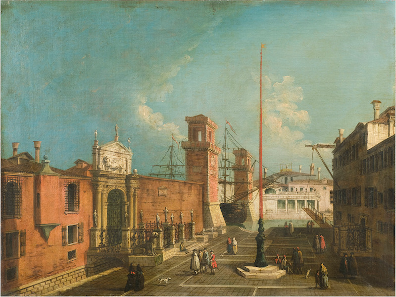 Veduta del campo e delle porte dell'ArsenaleView of the Square and the Door to the Arsenaltitle QS:P1476,it:"Veduta del campo e delle porte dell'Arsenale" label QS:Lit,"Veduta del campo e delle porte dell'Arsenale" label QS:Lde,"Blick auf den Vorplatz und ein Portal des Arsenals"